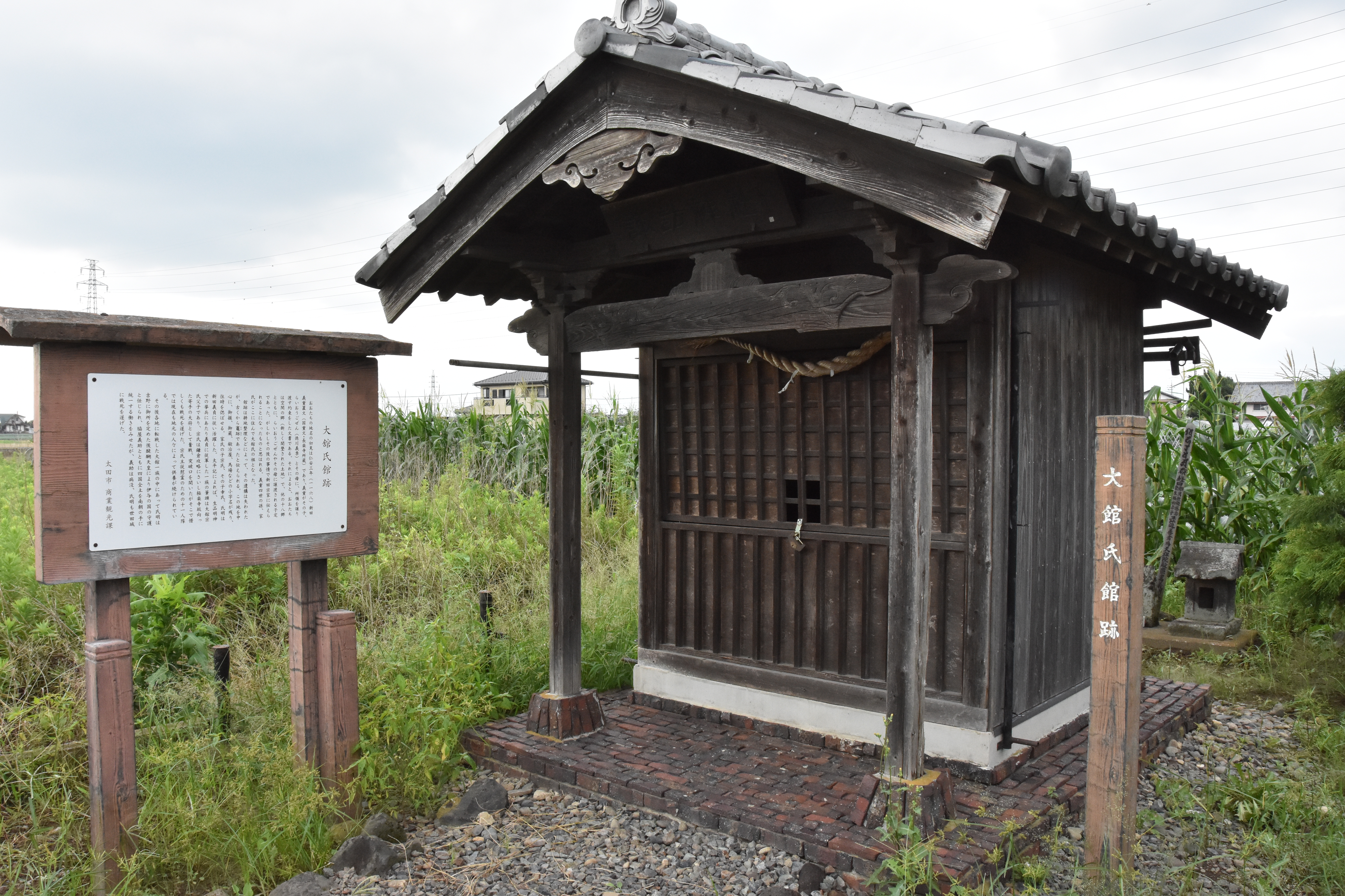 大舘氏館跡。中心地には諏訪神社が建立され大舘氏館跡の石碑が建立されている。